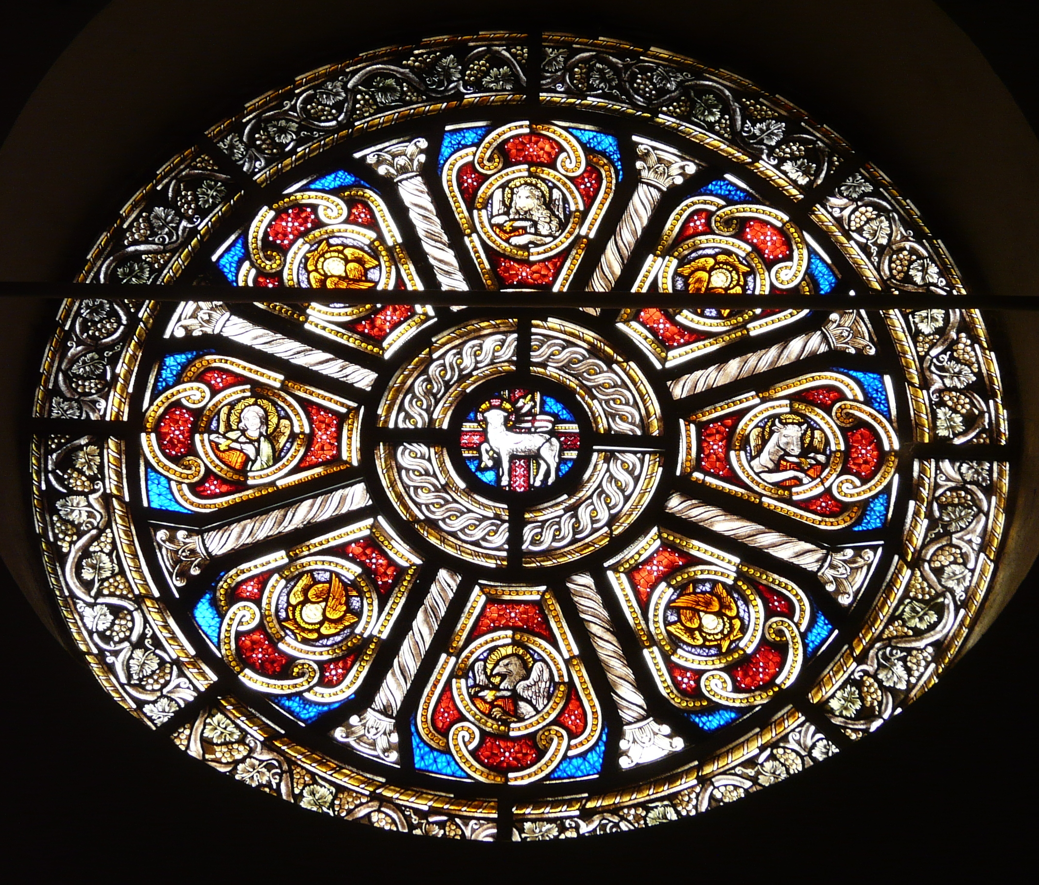 Rosone interno della cattedrale di Brugnato, Liguria, Italia